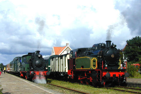 De STAR locomotieven uit de begin tijd, (links Emma en rechts Anna) te Stadskanaal. Deze locomotieven werden in de zomer van 1994 van de Vereinigung zur Erhaltung Historischen Eisenbahnmaterials e.V. (VEHE), die een museumspoorlijn hadden tussen Dollnstein en Rennertshofen had overgenomen. Begin 2012 is de locomotief Emma verkocht aan Bayerisches Eisenbahnmuseum Nördlingen e.V. (BEM) en de locomotief Anna aan een Duitse particulier.